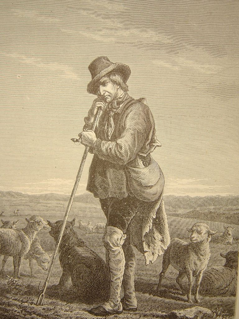 le berger des Ardennes par V.DeDoncker